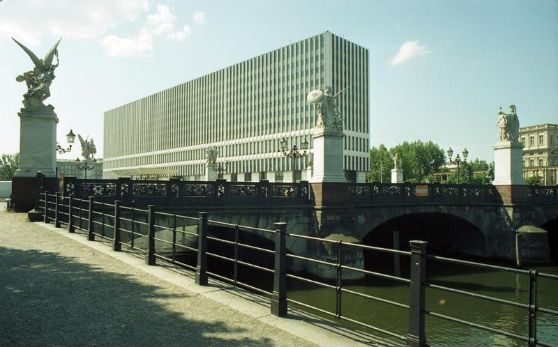 22.7.1991 Berlin-Mitte Schloßbrücke über die Spree mit ehemaligem DDR-Außenministerium